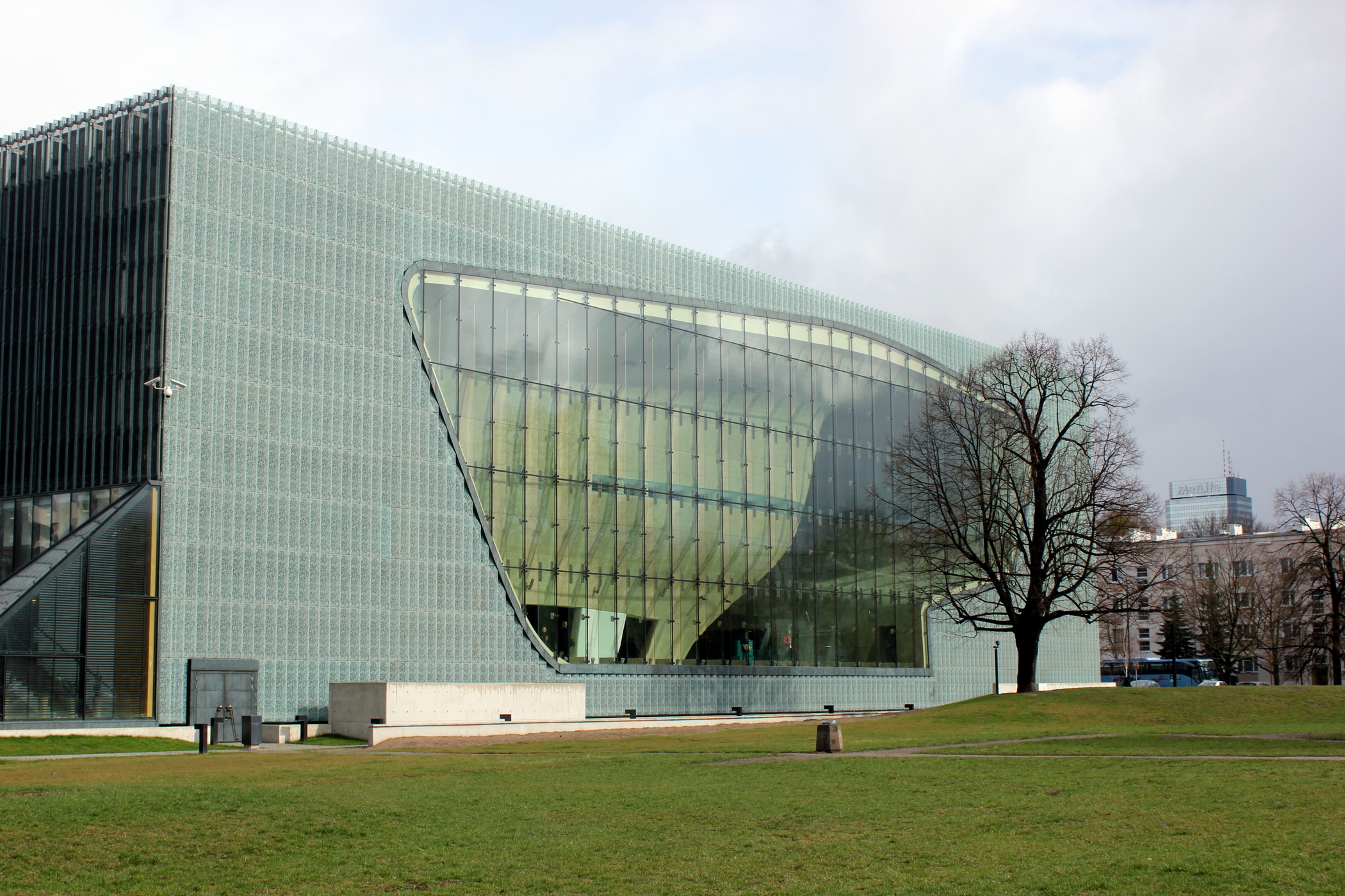 Museum der Geschichte der polnischen Juden, Warschau. Außenansicht.Hornjoserbsce: Muzej stawiznow pólskich Židow we Waršawje.